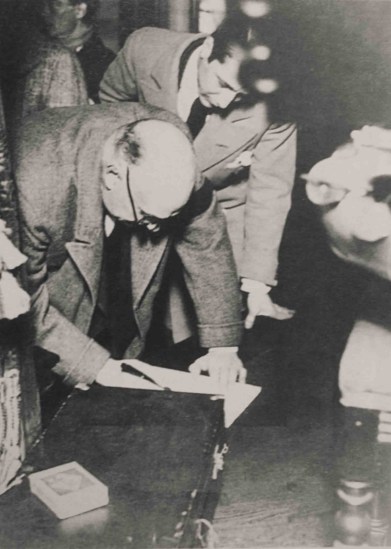 Alvear firma una carta antes de tener que exiliarse en 1931.